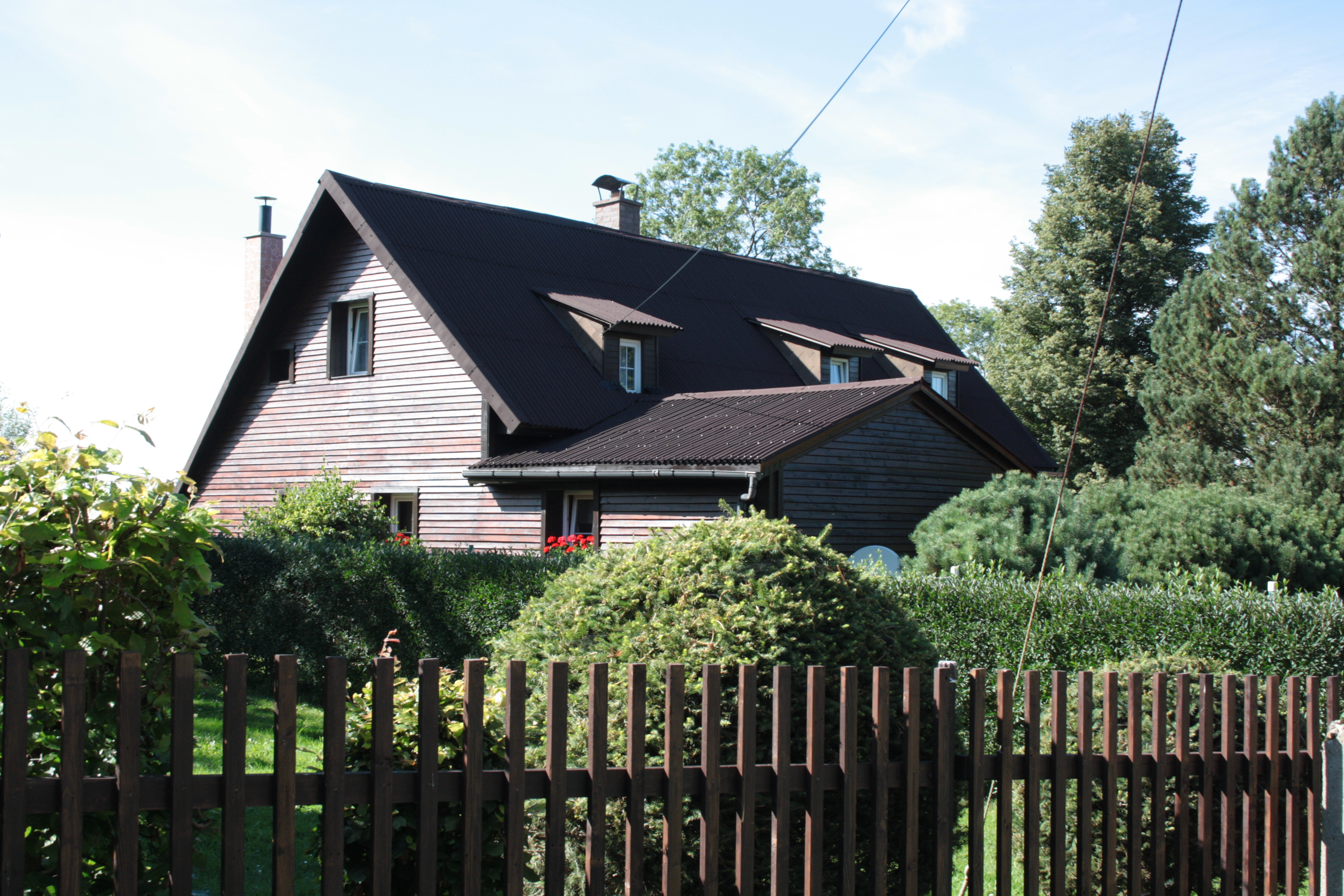 This photograph was taken with a DSLR from WMCZ's Camera grant. Dům evidenční číslo 24 v Dětřichovci, součásti Jindřichovic pod Smrkem.